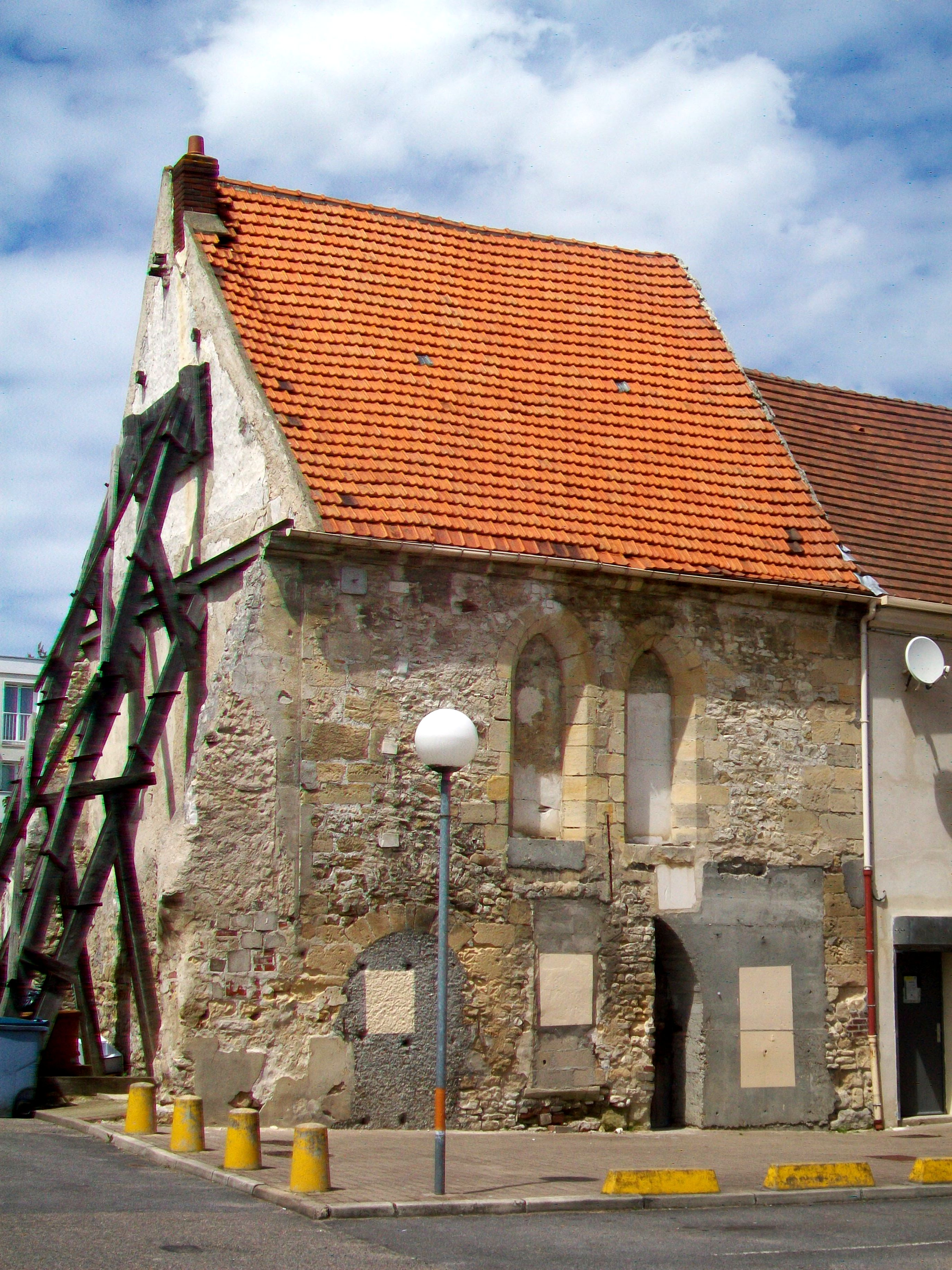 Ancien hôtel-Dieu de Champagne sur Oise, 26 rue des Martyrs, au milieu d'une résidence moderne.